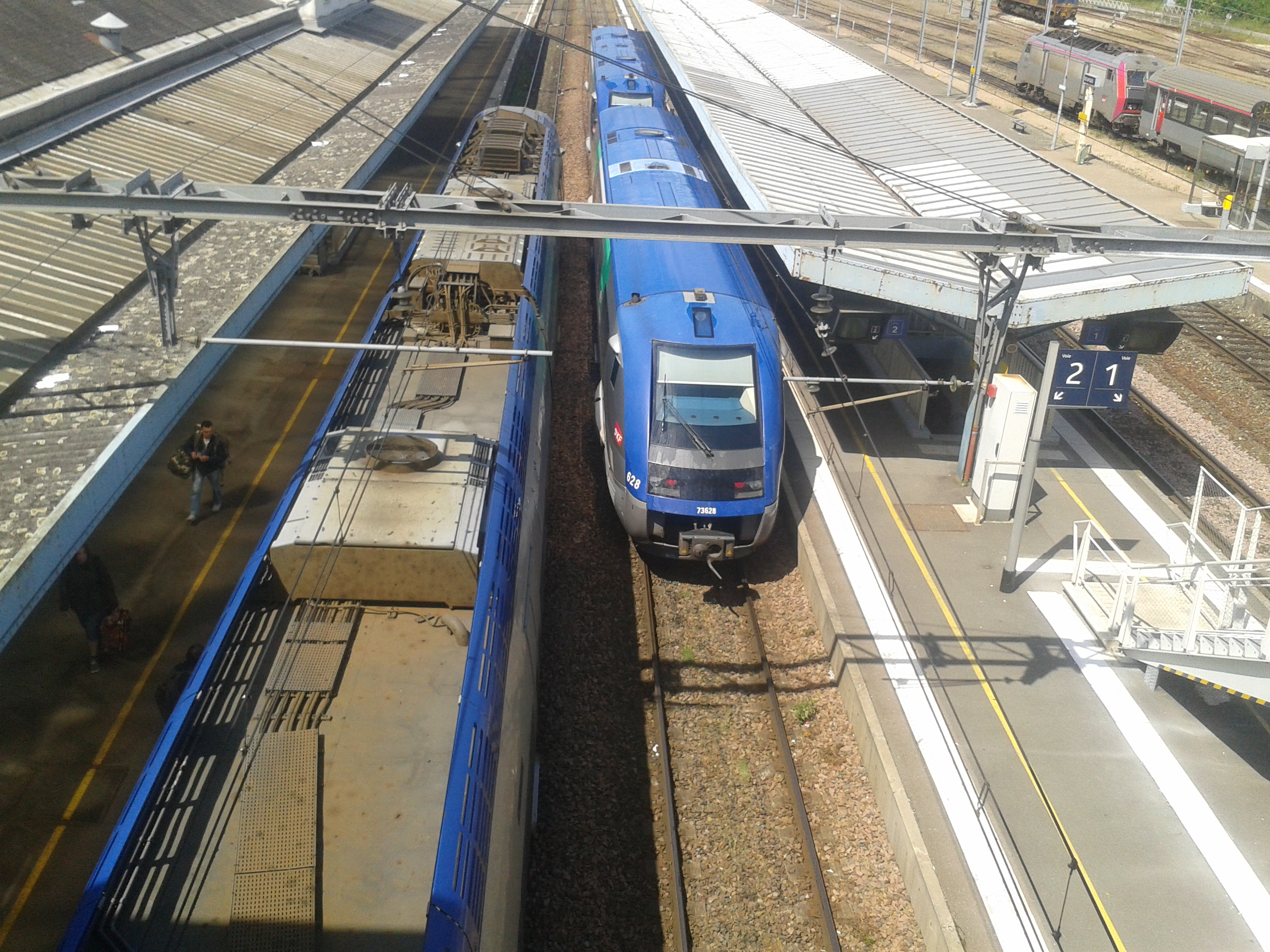 Vue des quais de la gare de Bourges